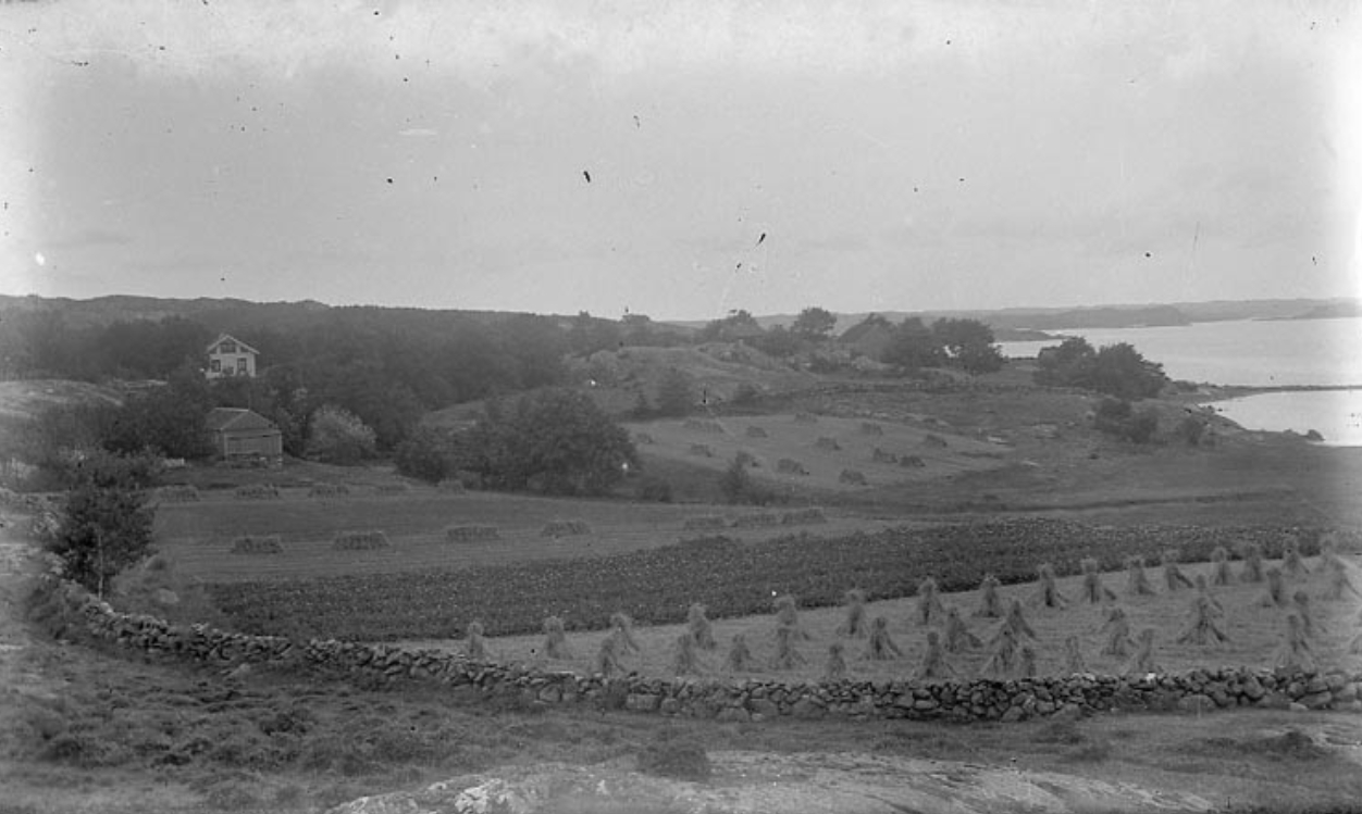 "Översta Gläfse o Kvarnhagen", stengärdesgårdar, åkrar och sädesskylar i Bohuslän.